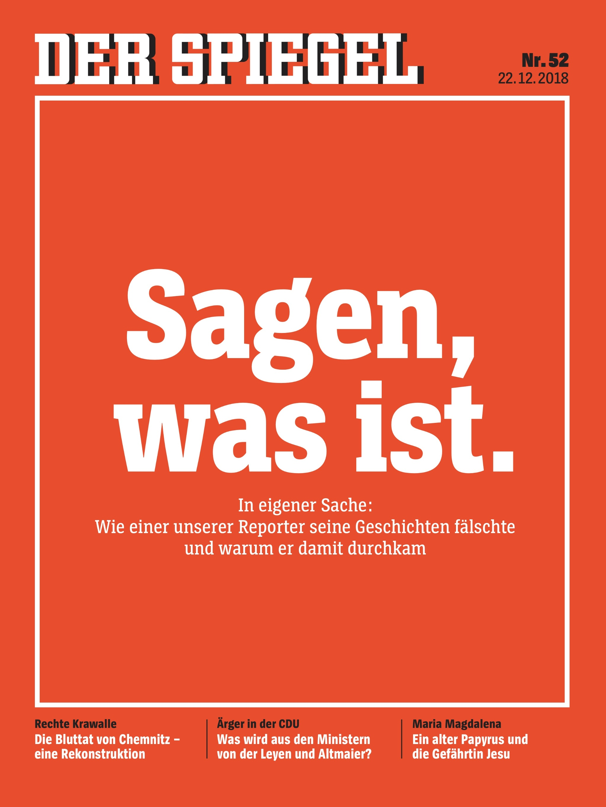 Das Spiegel-Cover "Sagen was ist." (zum Thema: Claas Relotius)